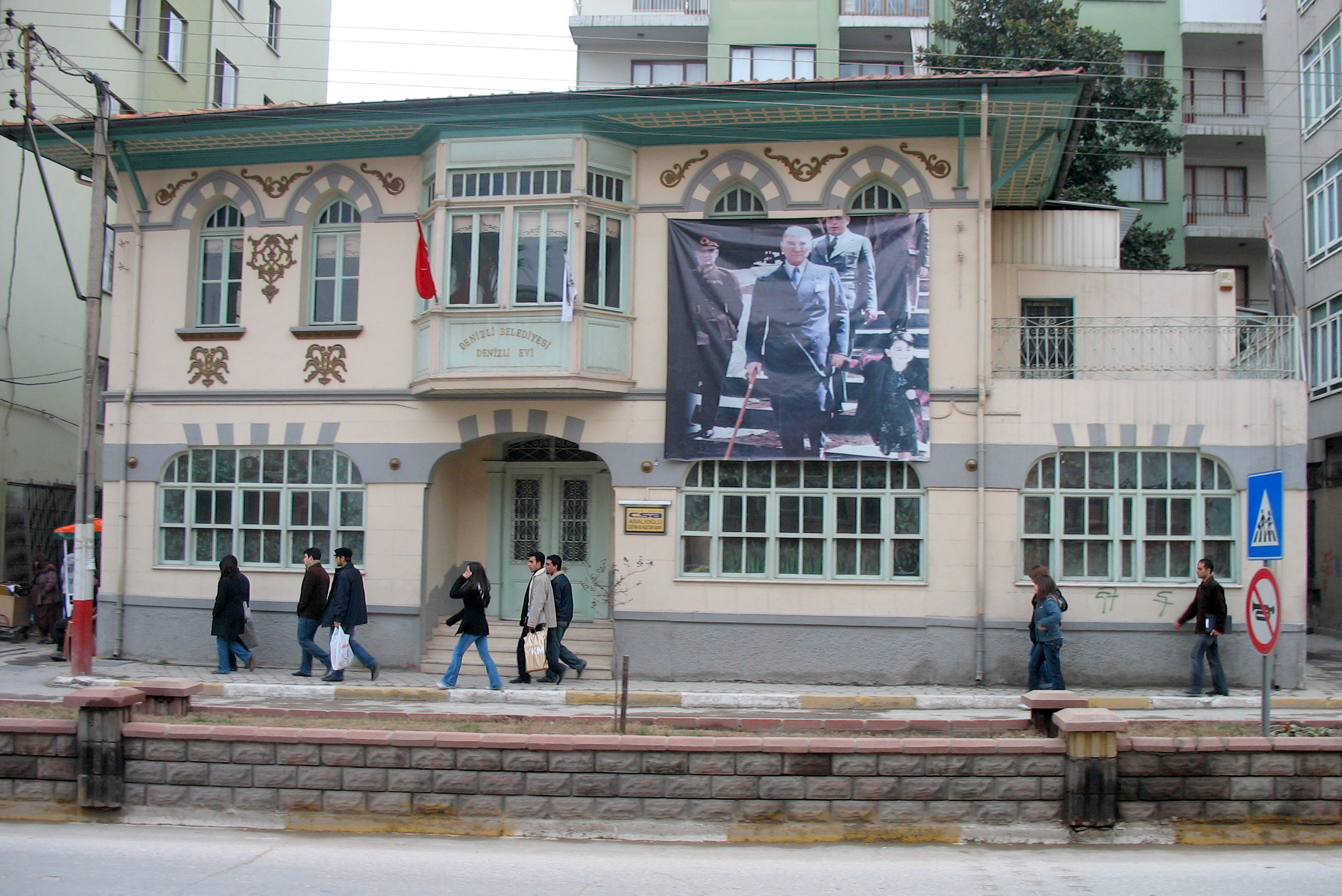 Örnek Denizli evi